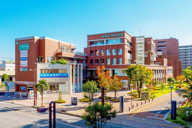 病院外観図